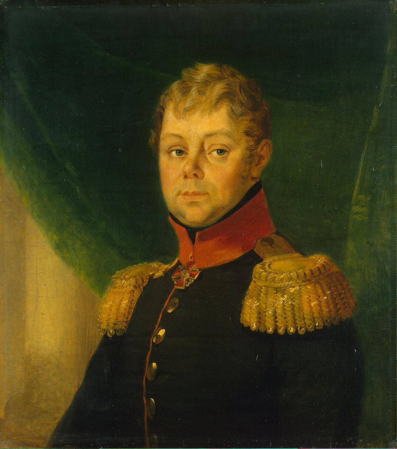 Fyodor Viktorovich Nazimov (09.12.1764 – 07.03.1827) russian general